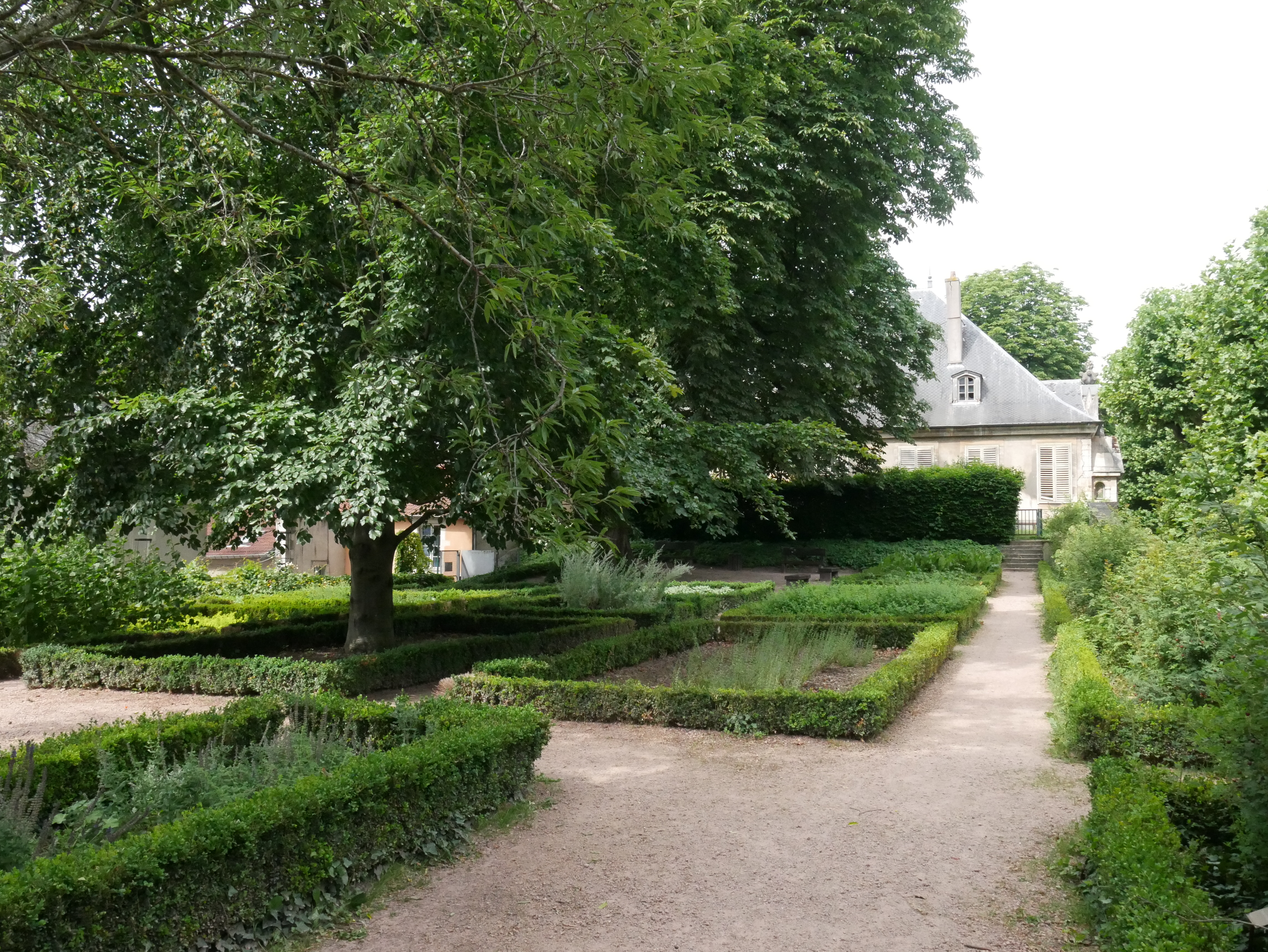 Jardin de la citadelle à Nancy, situé en haut du rempart jouxtant la porte de la Citadelle.